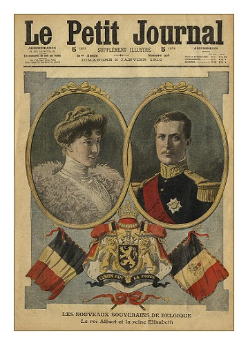 Albert belga király és Erzsébet belga királyné a korabeli Le Petit Journal címlapján, beiktatásuk után